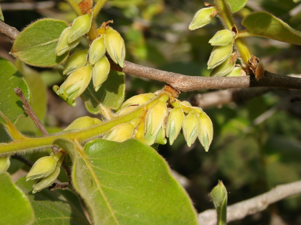 Diospyros hispida - EBENACEAE - Parque Olhos D'Água - Brasília - Distrito Federal - Brasil.